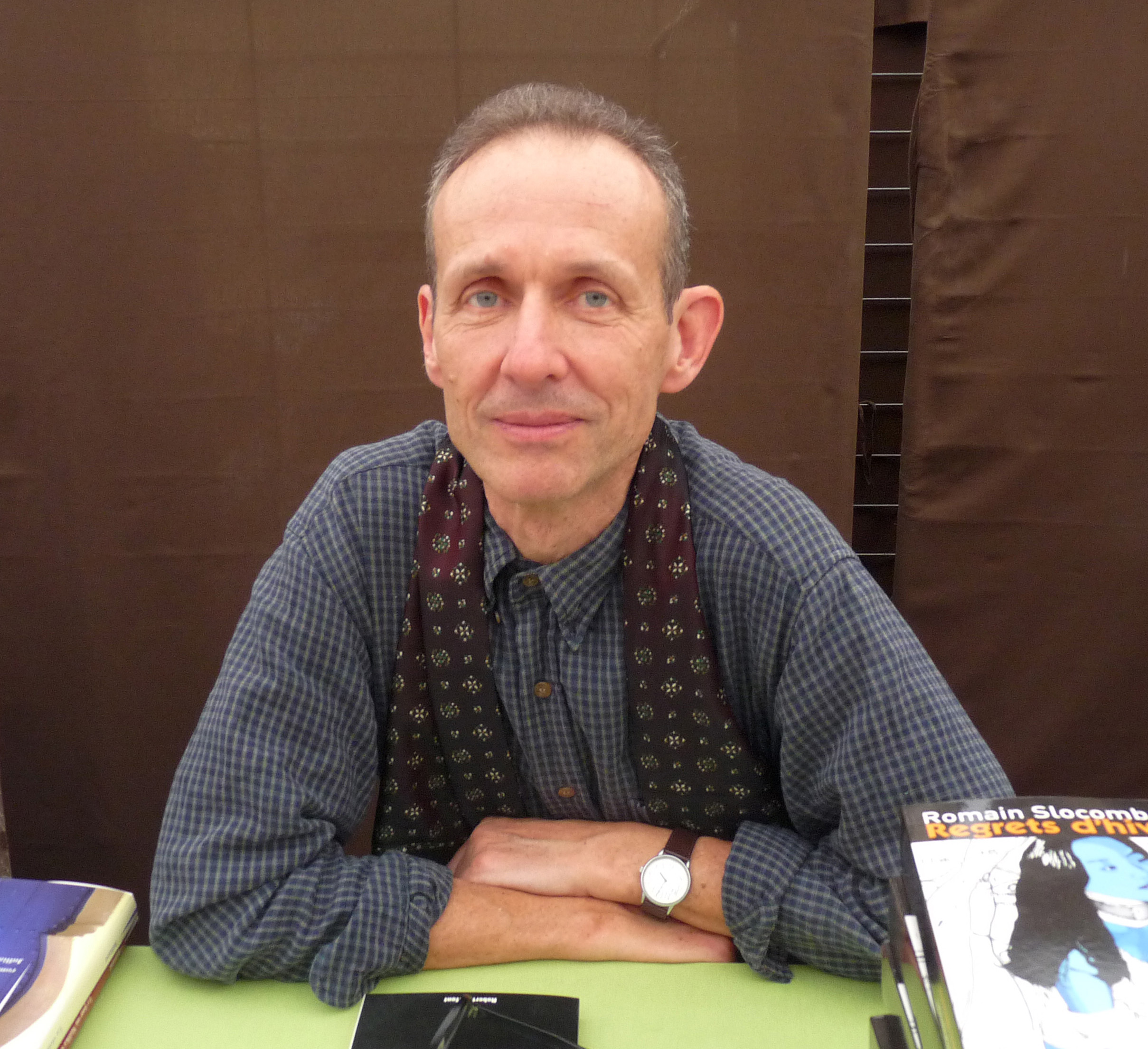 Romain Slocombe en dédicace dans le cadre du "Livre sur la Place", Nancy, septembre 2011